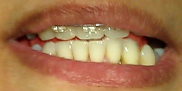 Interposition linguale entre les deux arcades dentaires au cours de la phonation.